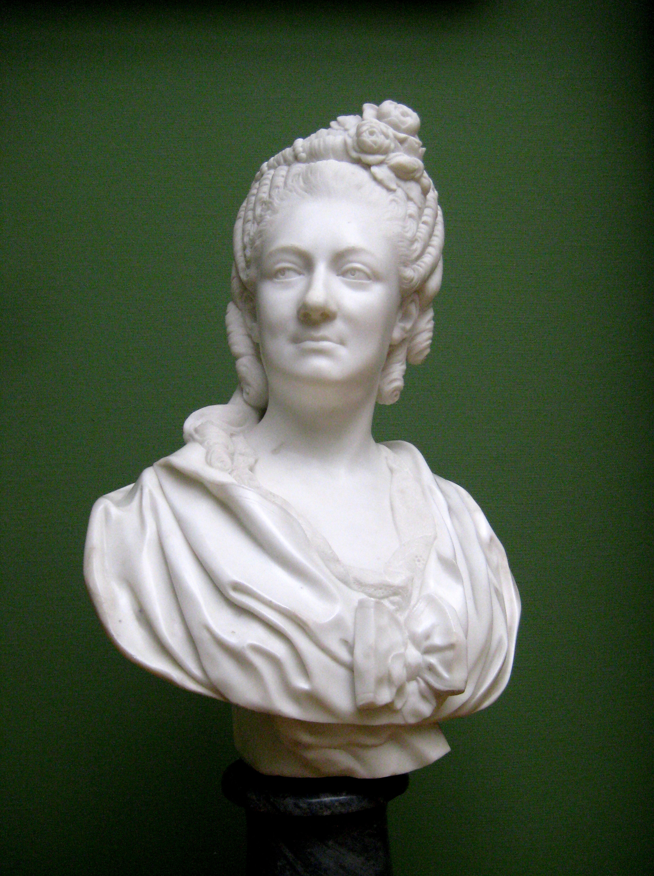 Бюст графини Марии Паниной работы Ф. Шубина. Мрамор, сер. 1770-х. ГТГ